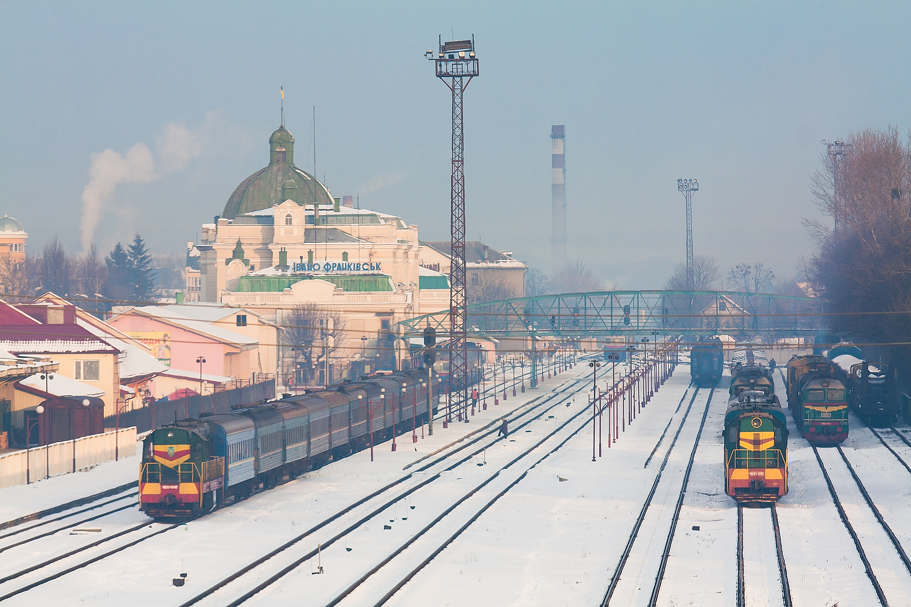 Вид на вокзал з моста.